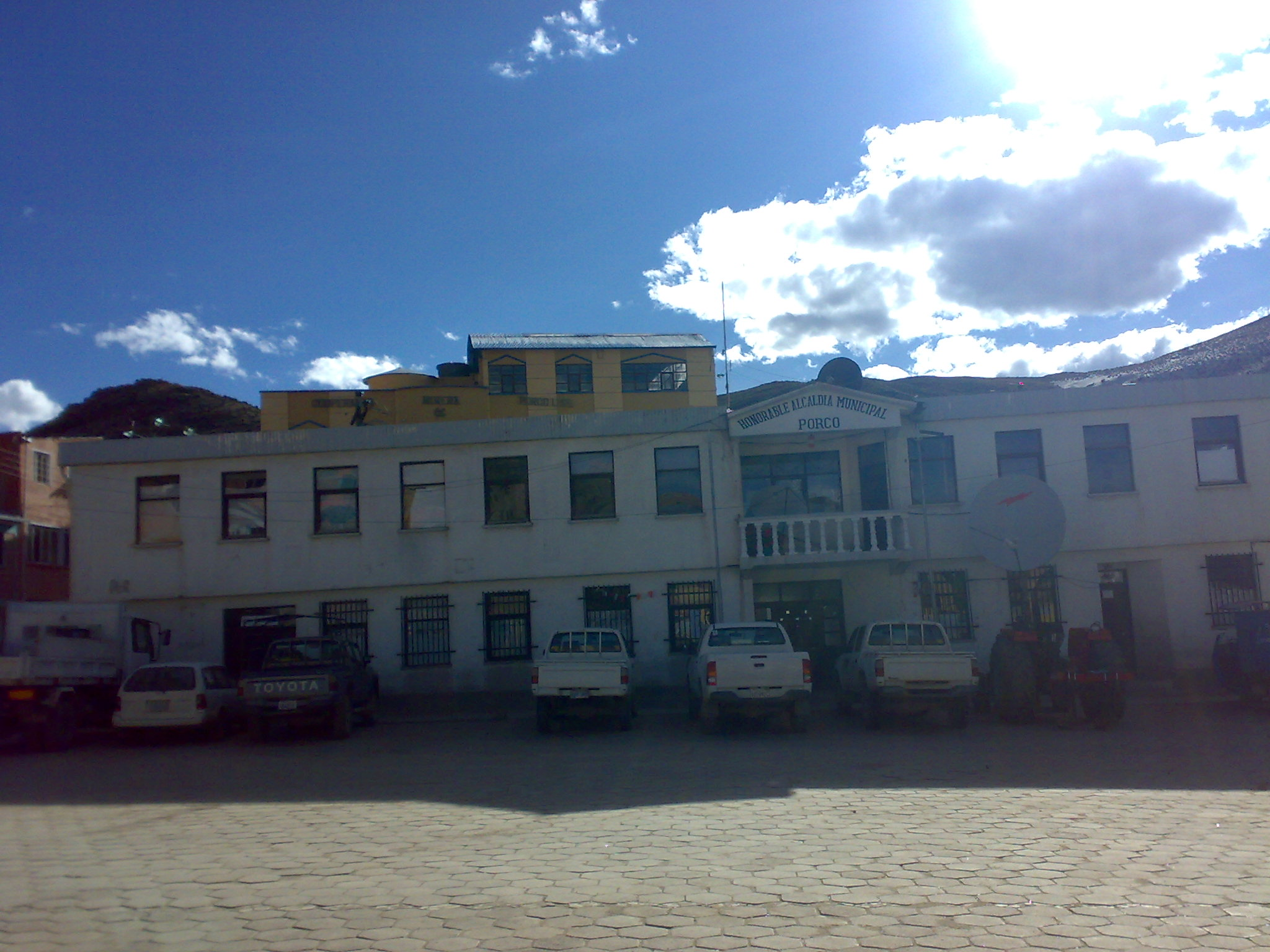 Edificio del Honorable Gobierno Autónomo Municipal de Porco, ubicado en la Plaza Central de la localidad.